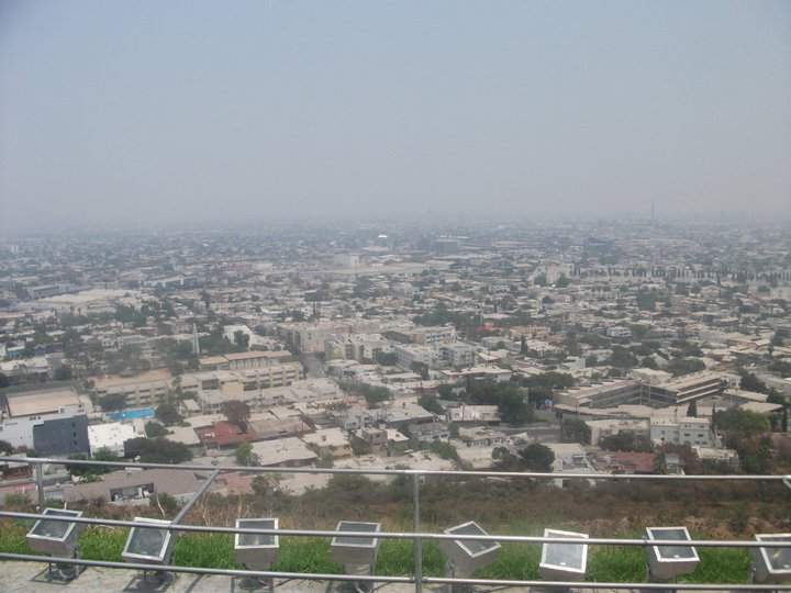 Esta es la vista que se tiene desde el Mirador del Obispado ubicado en Monterrey, Nuevo León